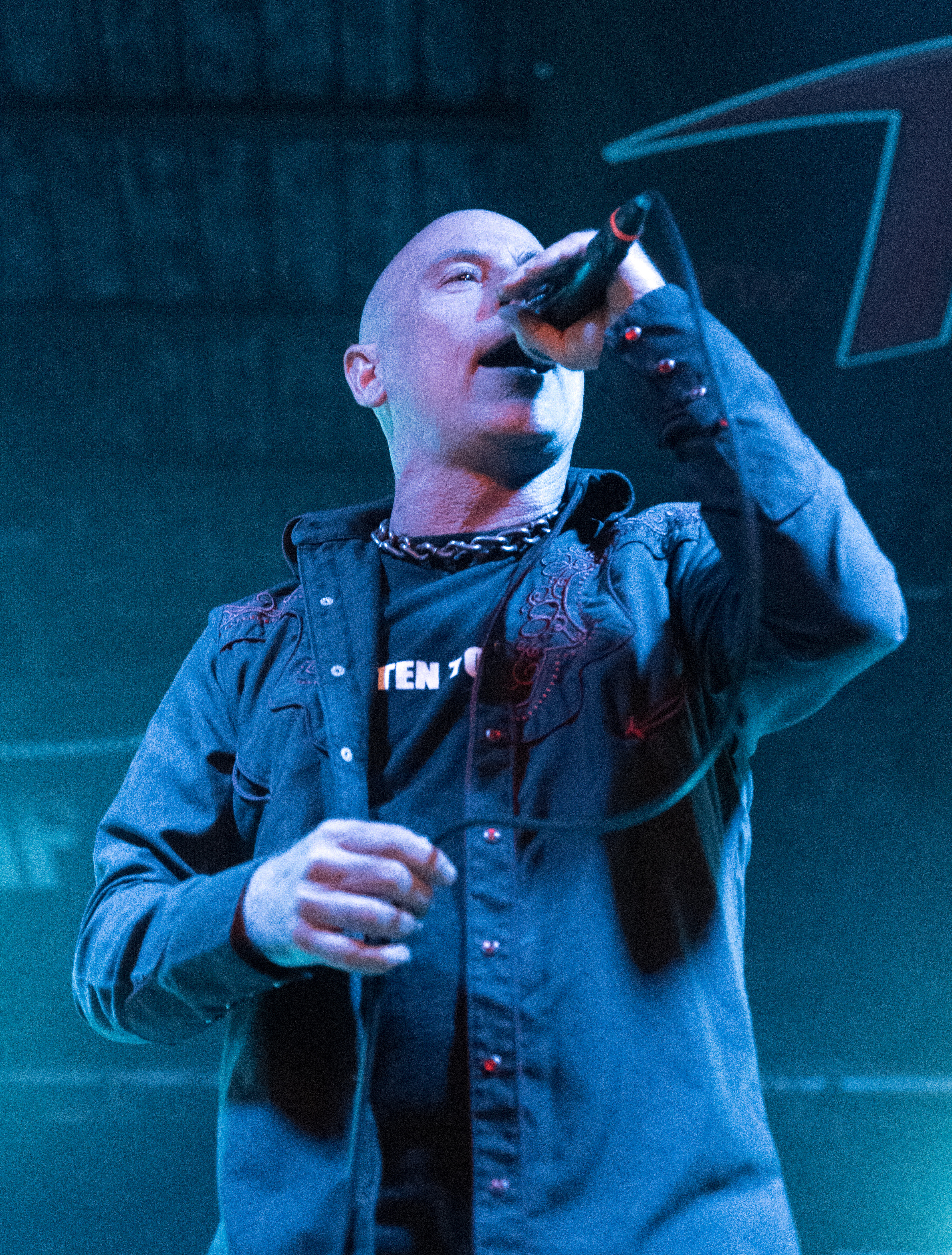 Armored Saint beim Headbangers Open Air 2016